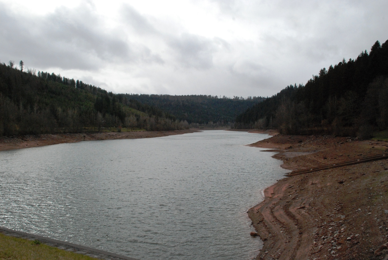 Nagoldtalsperre in Grömbach (links) und Seewald (rechts)